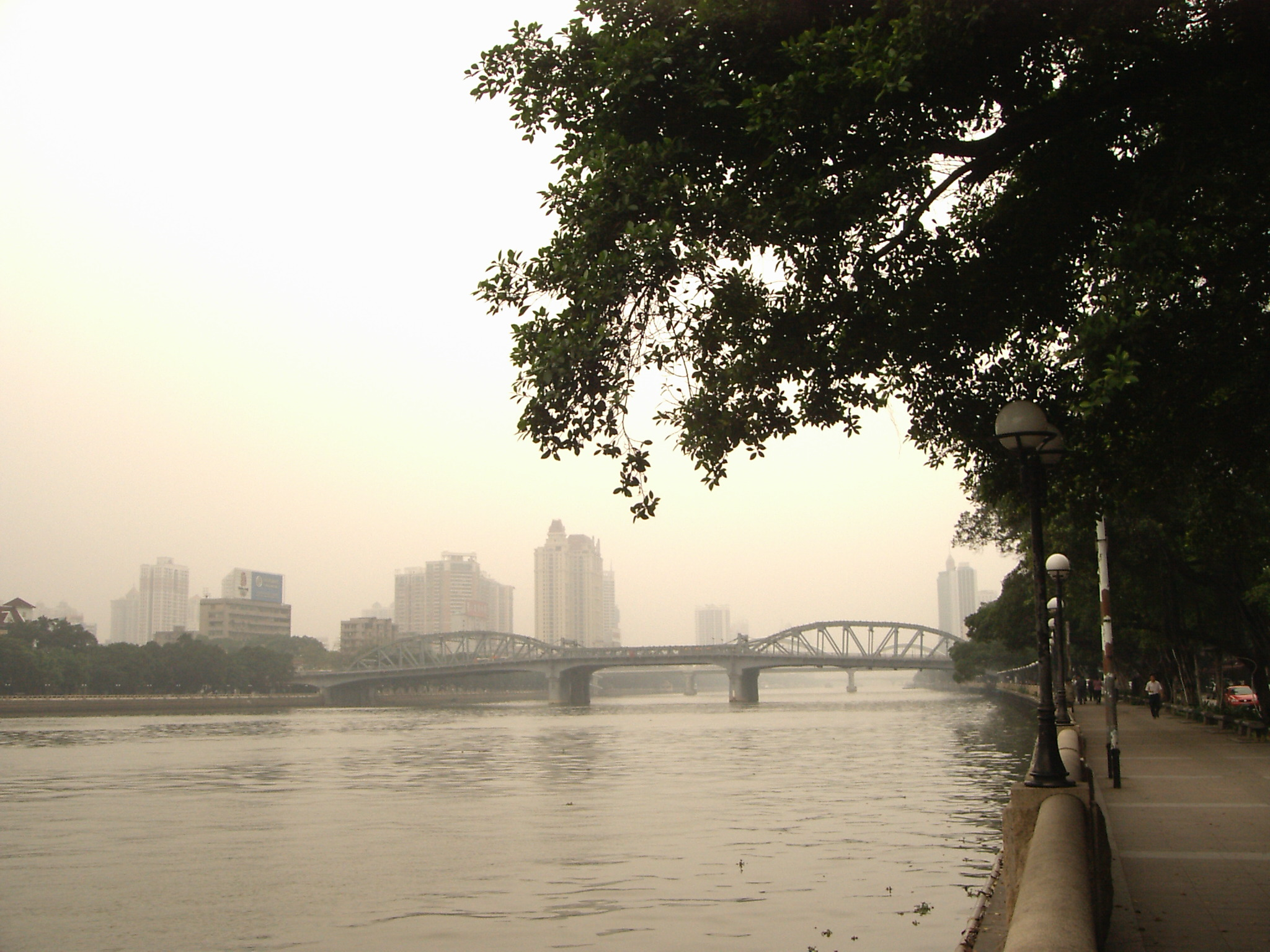 广州海珠桥